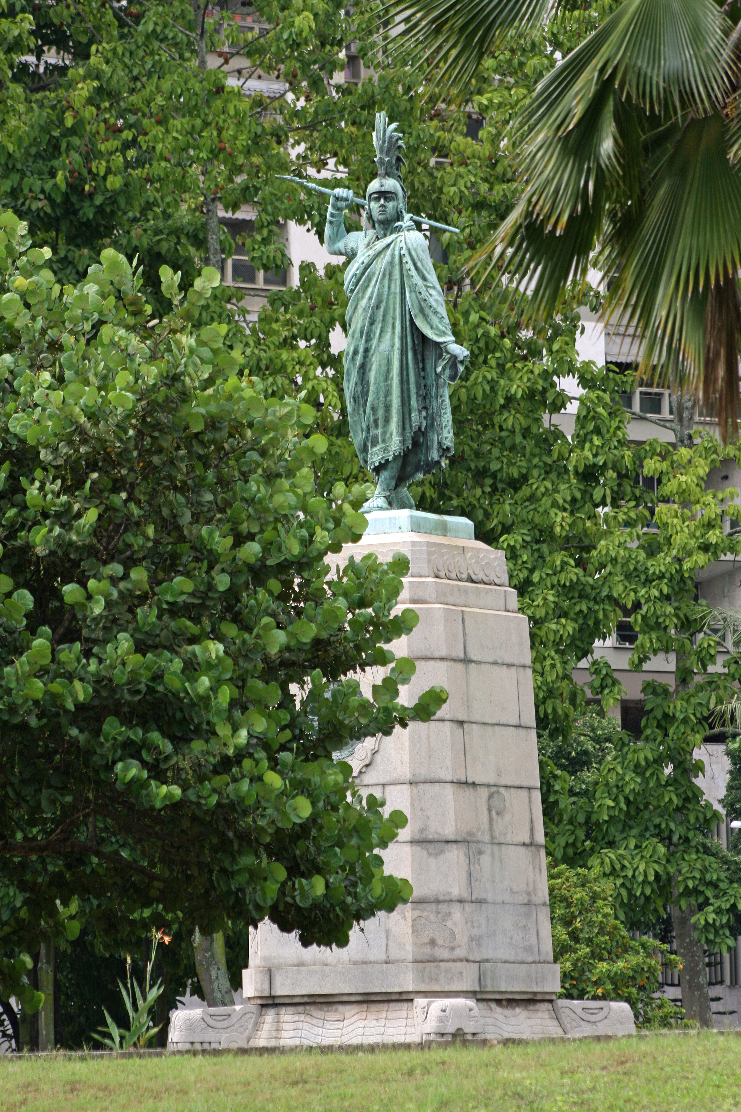 Monumento ao índio asteca Cuauhtémoc